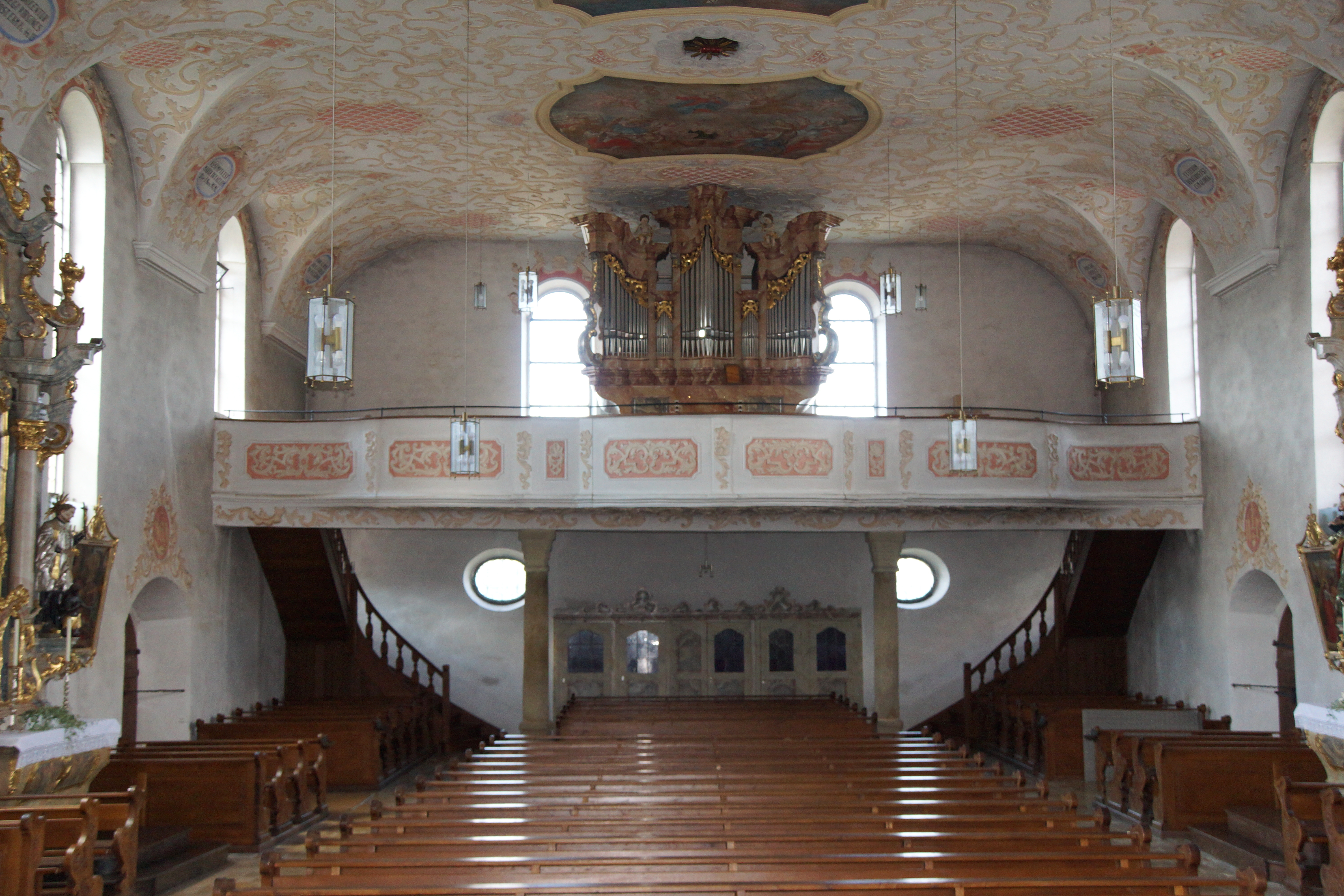 Pfarrkirche St. Martin in Luhe